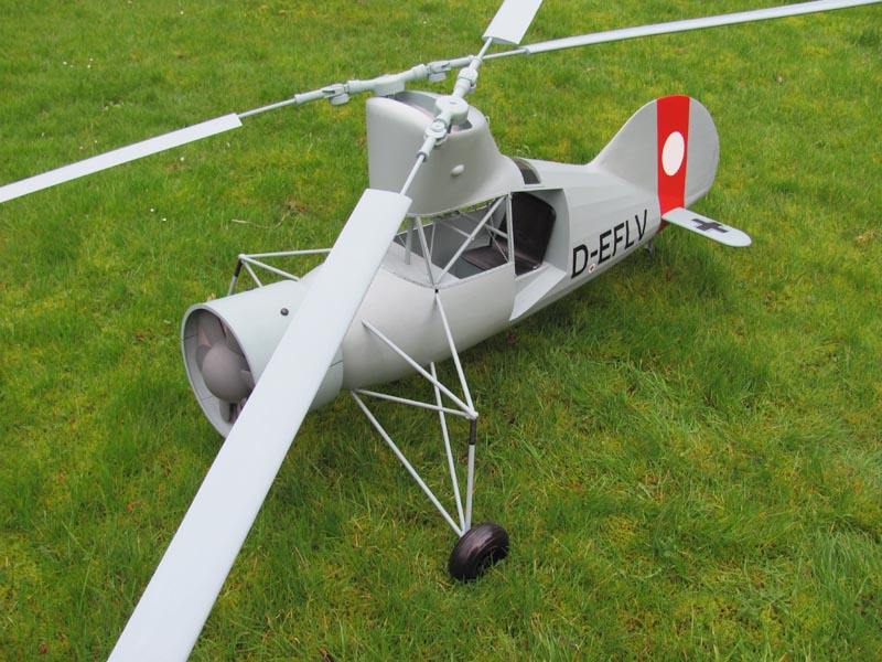 Flettner Fl 265 Modell im Maßstab 1:4,6 im Hubschraubermuseum Bückeburg